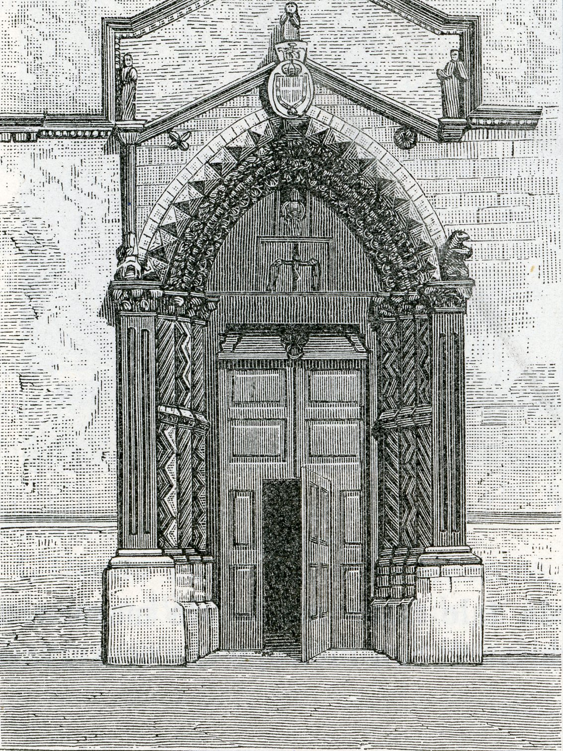 Vasto: porta della chiesa di San Pietro (xilografia di Barberis 1898).